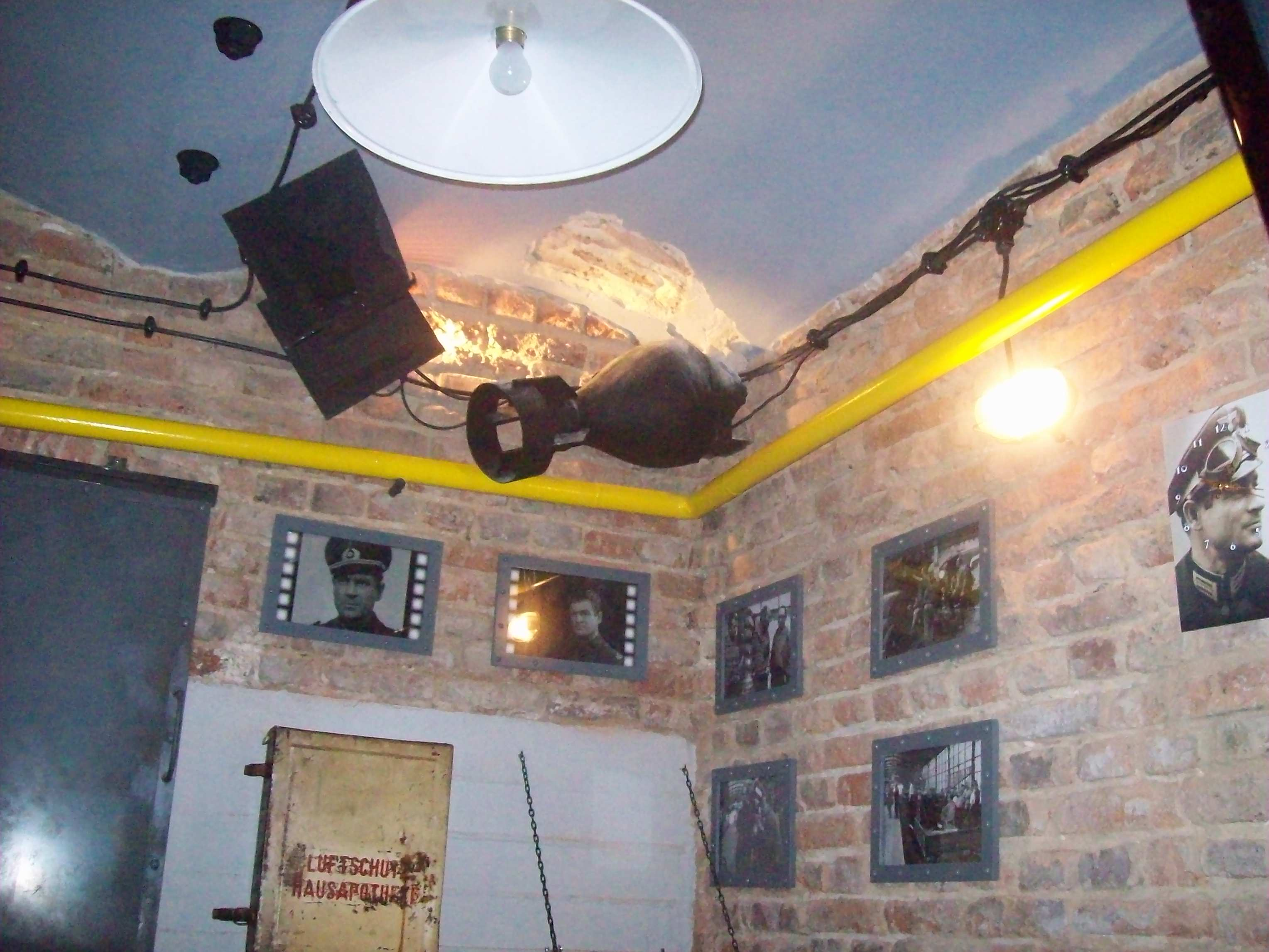 Muzeum Hansa Klossa, bomba lotnicza tkwiąca w ścianie.